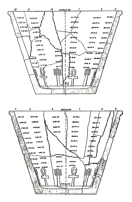 Sections de la partie interne de la clepsydre de Karnak